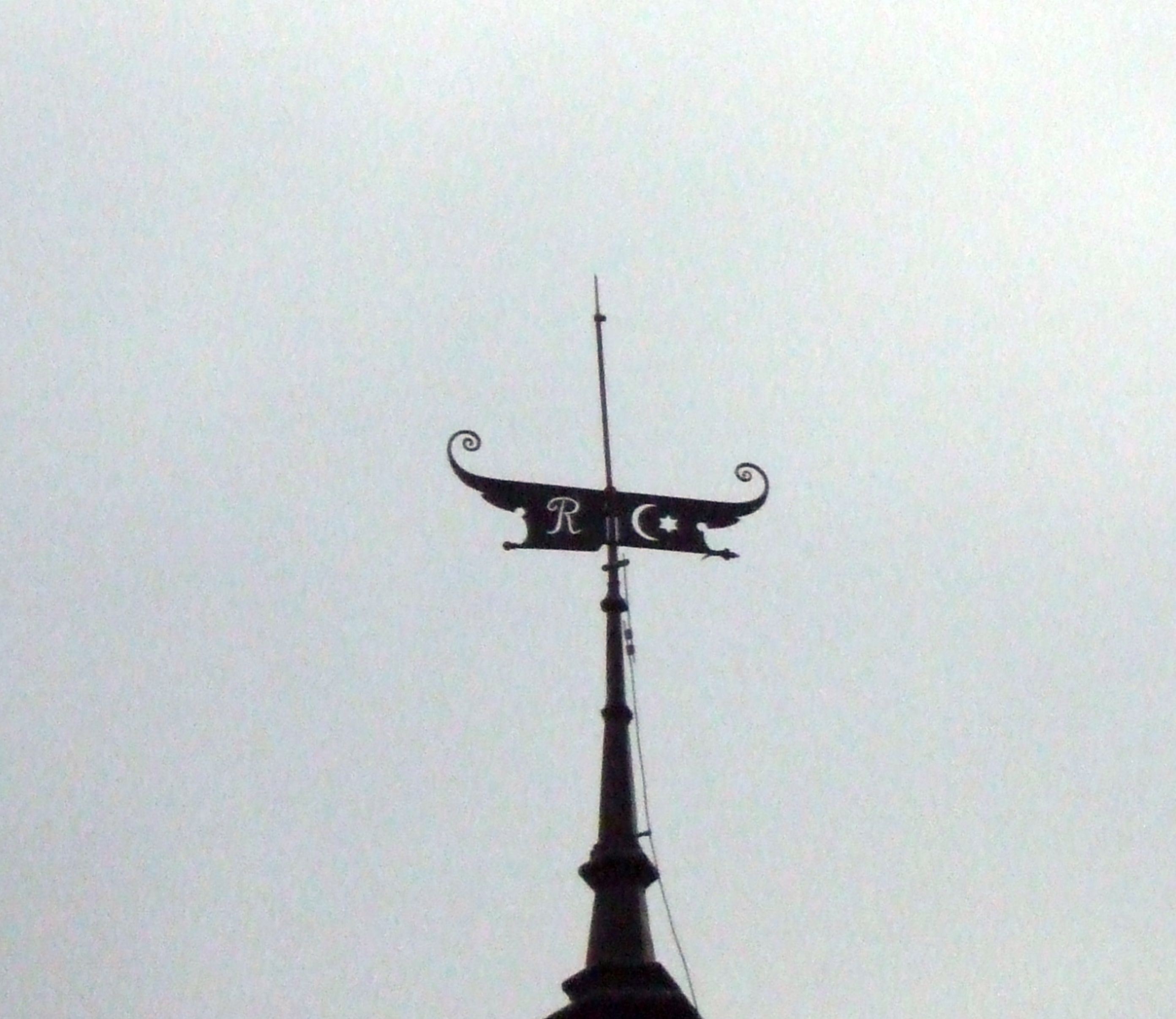 Kaštieľ Záturčie This medium shows the protected monument with the number 506-11426/1 in the Slovak Republic.